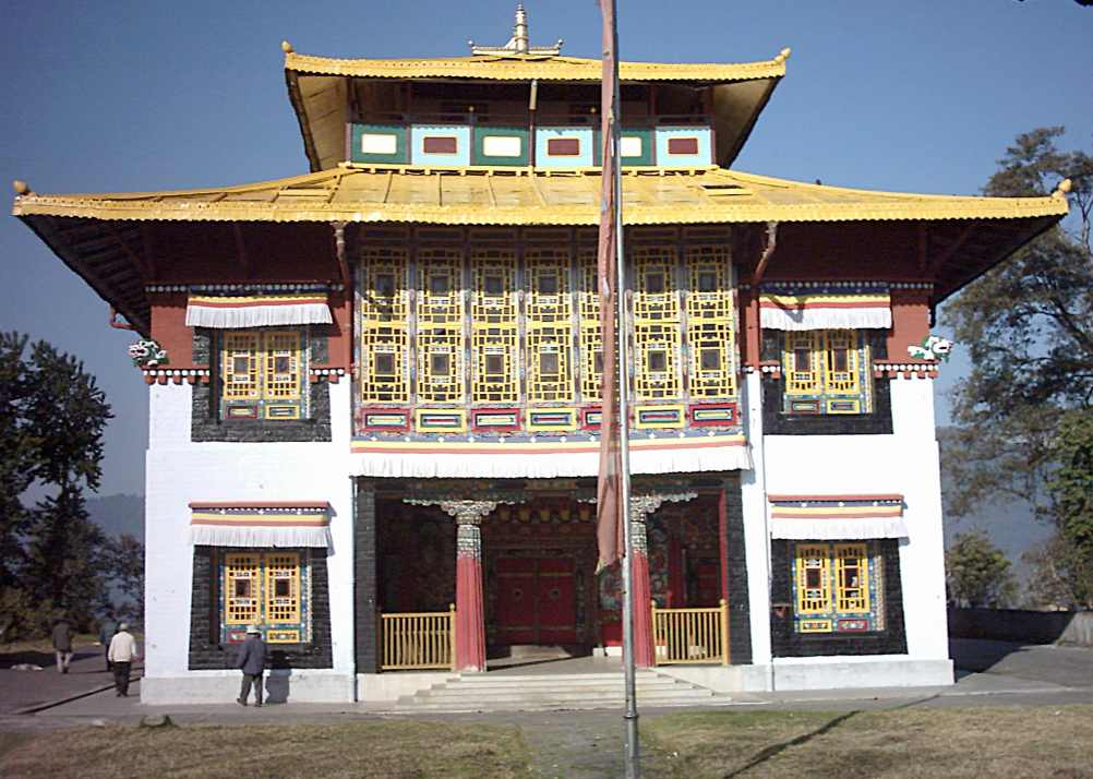 Tsuklakhang Palace monastery, Gangtok, Sikkim. Danny Burke